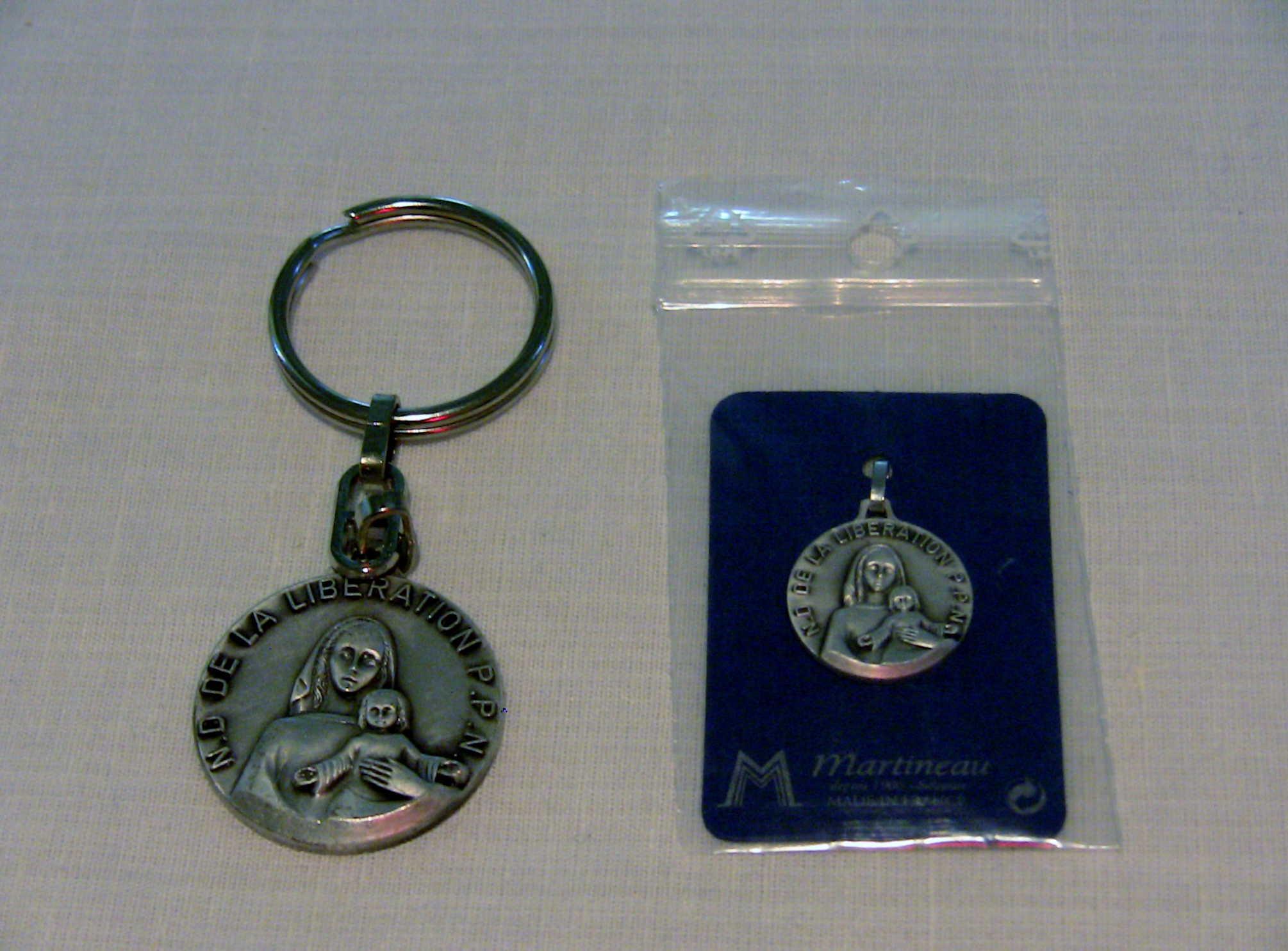 Podentifs de l'église de Notre-Dame de la Libération de Besançon (Doubs, France).